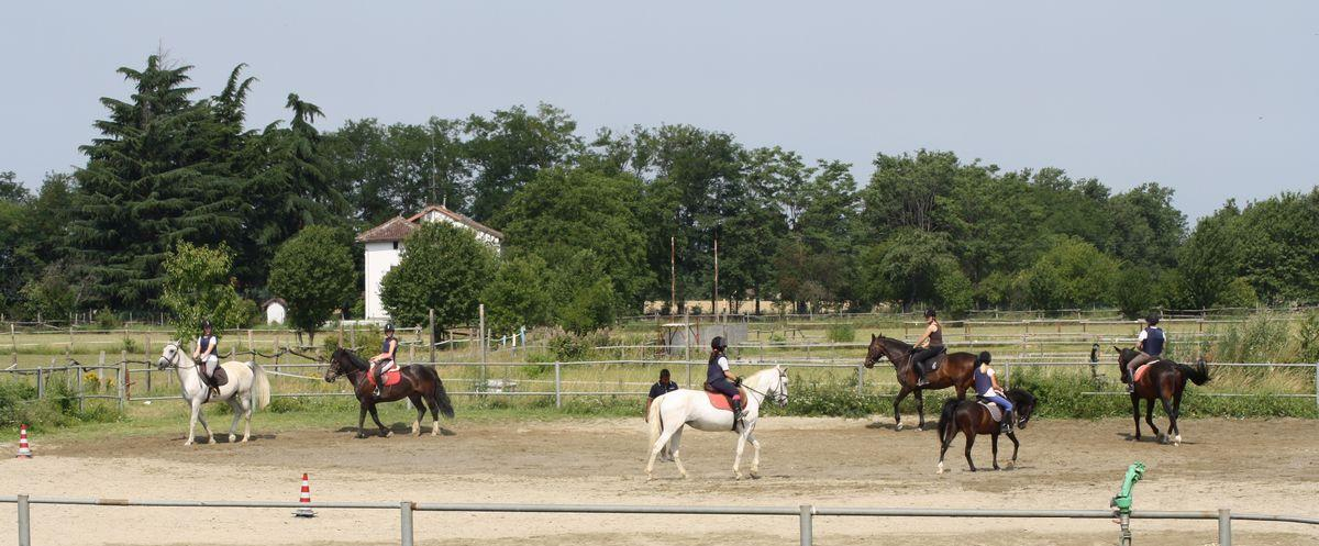 Lavoro in campo in un maneggio. Foto scattata durante uno stage alla "Scuderia La Bellaria"